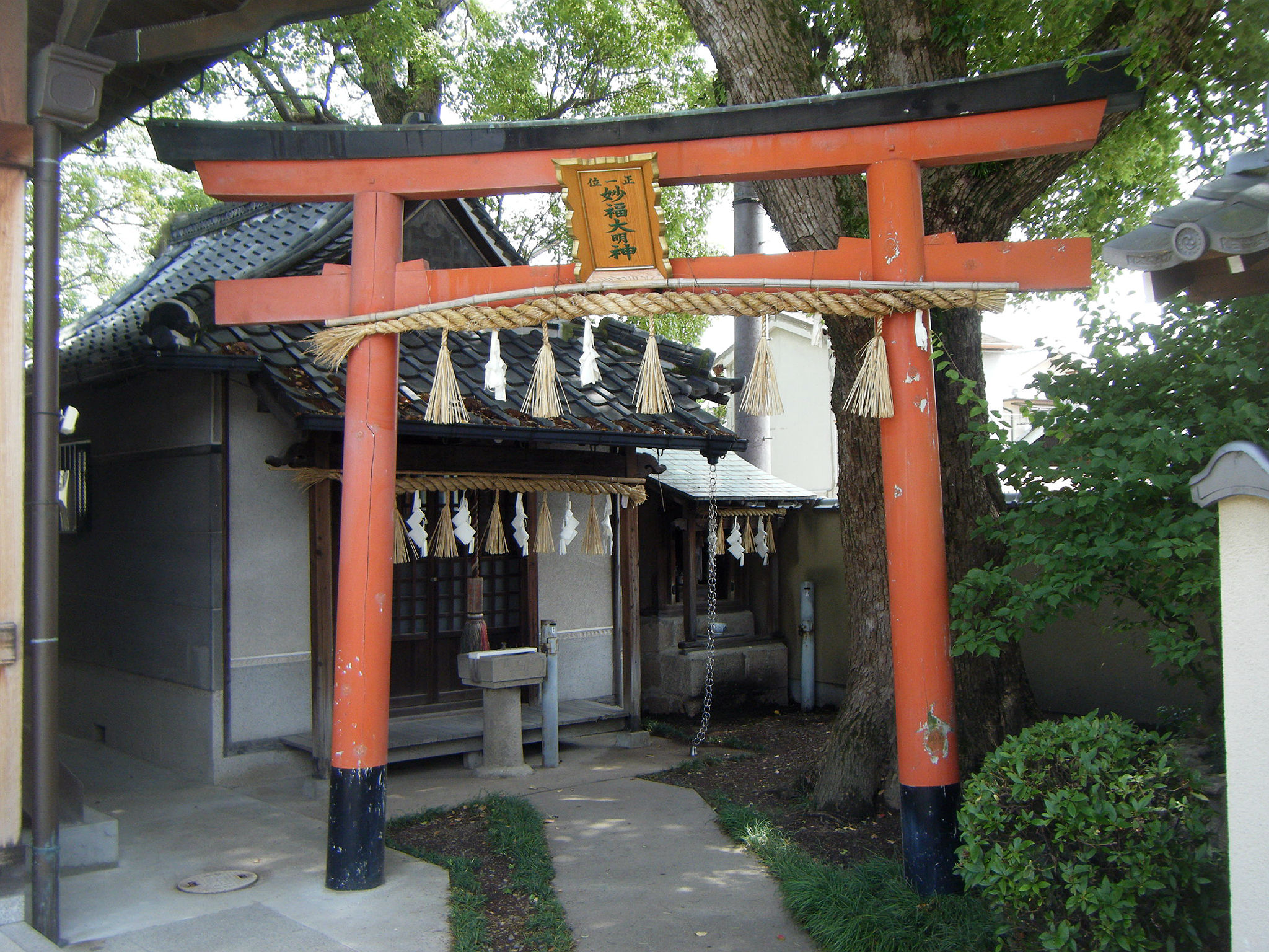 広済寺 妙福稲荷 兵庫県尼崎市